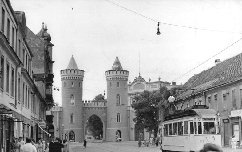 Zentralbild-Kohls-16.7.1960-Som-Qu- Vom 12.7. bis zum 2.8.1945 fand die historische Potsdamer Konferenz statt. Potsdam, Blick auf das Nauener Tor von der Friedrich Ebert Str. aus.